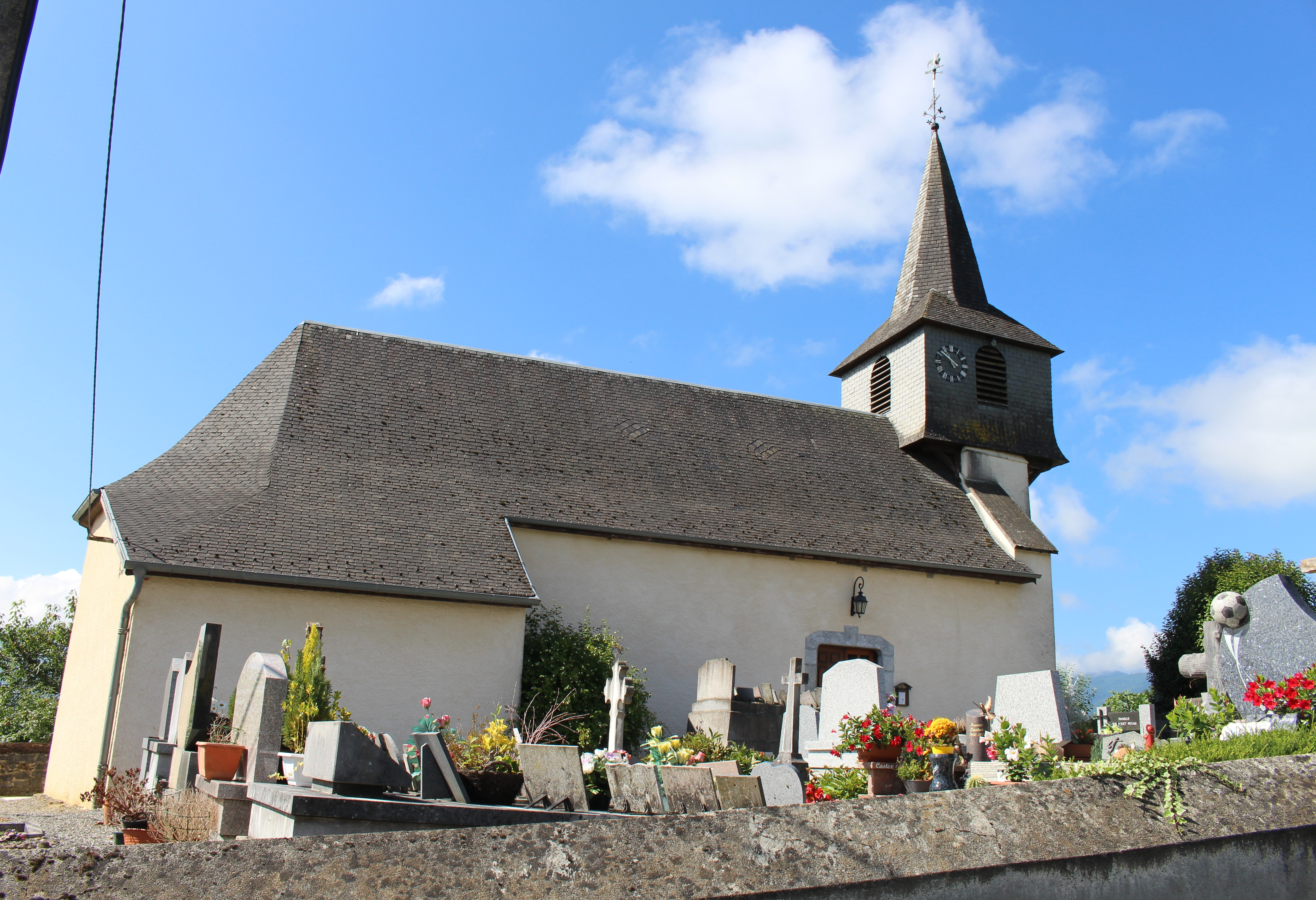 Église Saint-Etienne de Benqué (Hautes-Pyrénées)